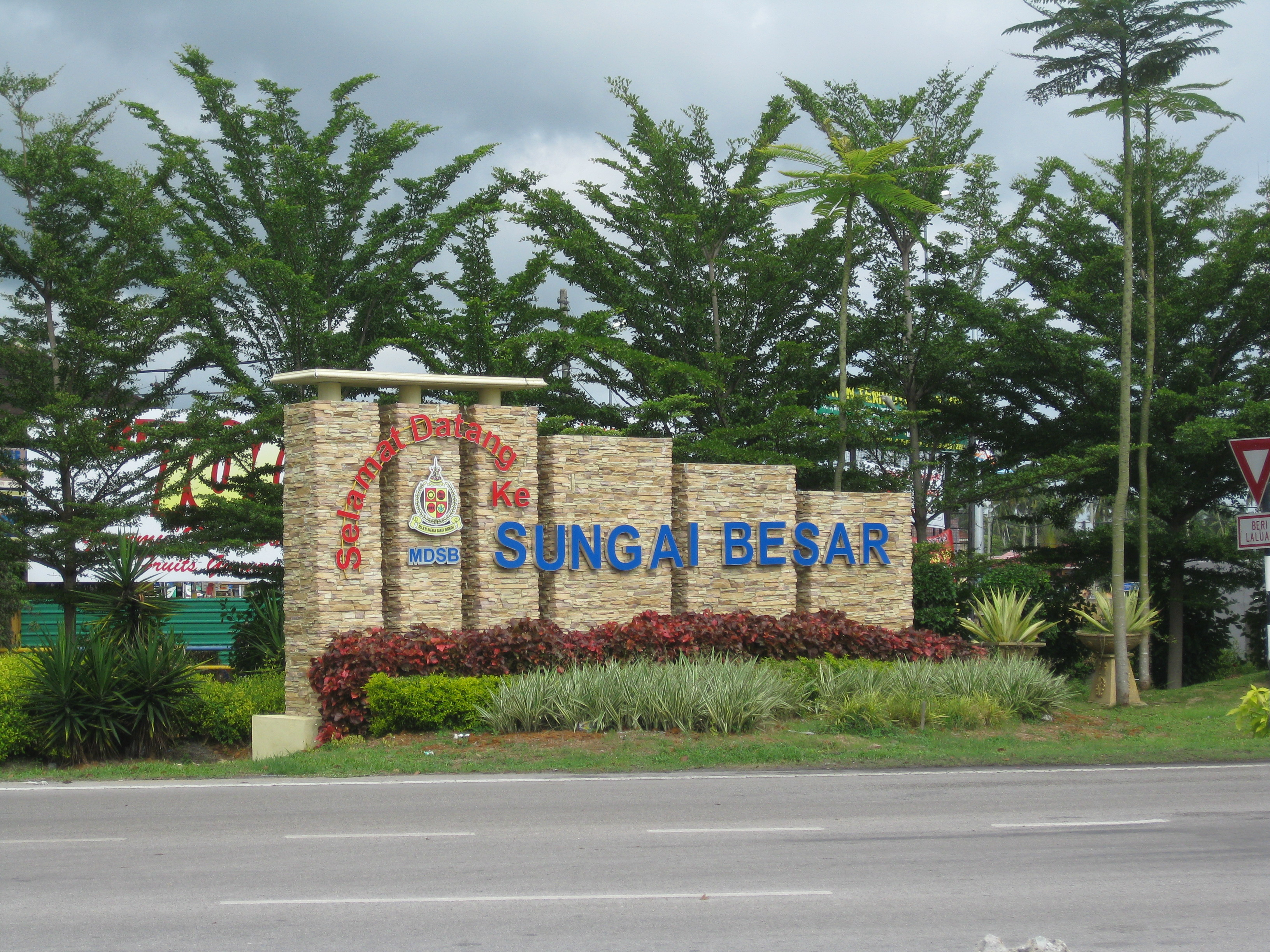 Hito a Sungai Besar, Sabak Bernam, Selangor